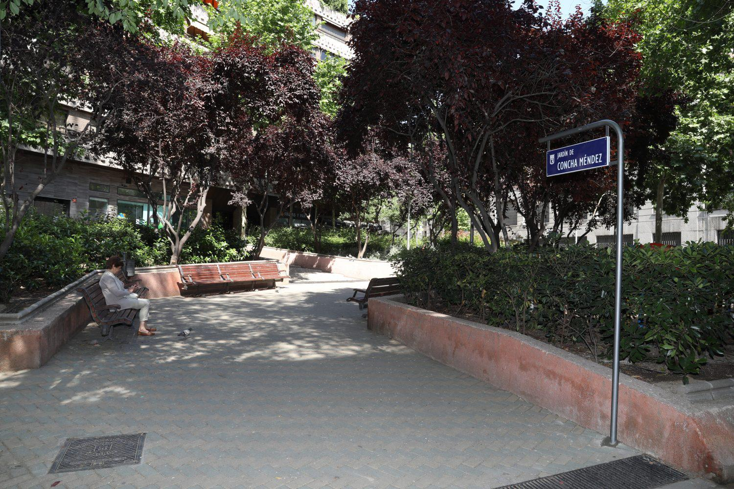 Para dar visibilidad a mujeres ilustres, dos zonas verdes de Chamberí tienen nombre de figuras madrileñas desde hoy. Se trata de la escritora y poeta de la Generación del 27, Concha Méndez, y Matilde Ucelay, la primera mujer española titulada en Arquitectura.